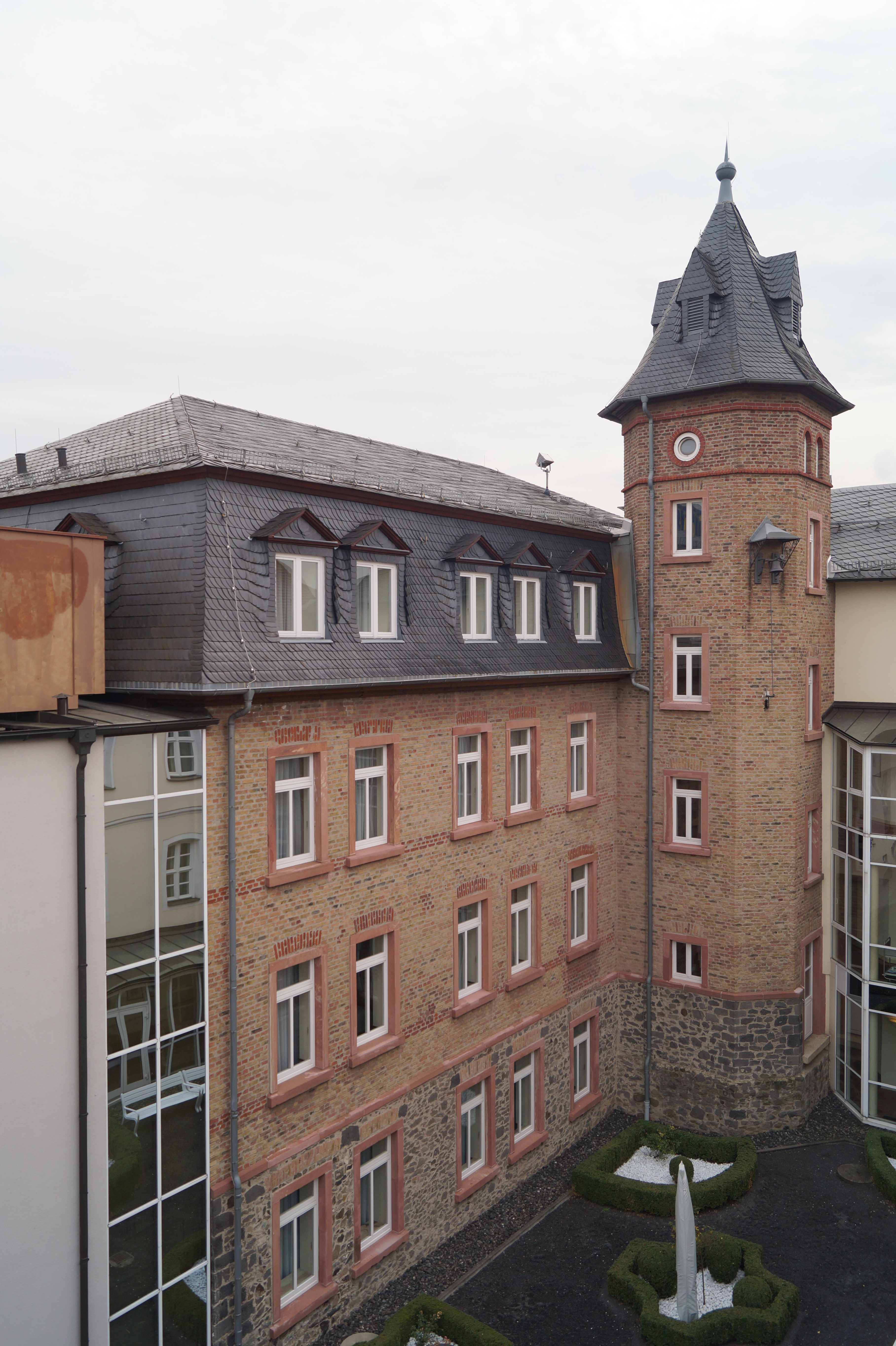 Villa Stokkum in Hanau-Steinheim, Blick in den Innenhof mit historischem Treppenturm der Zigarrenfabrik und modernen Hotelbauten.